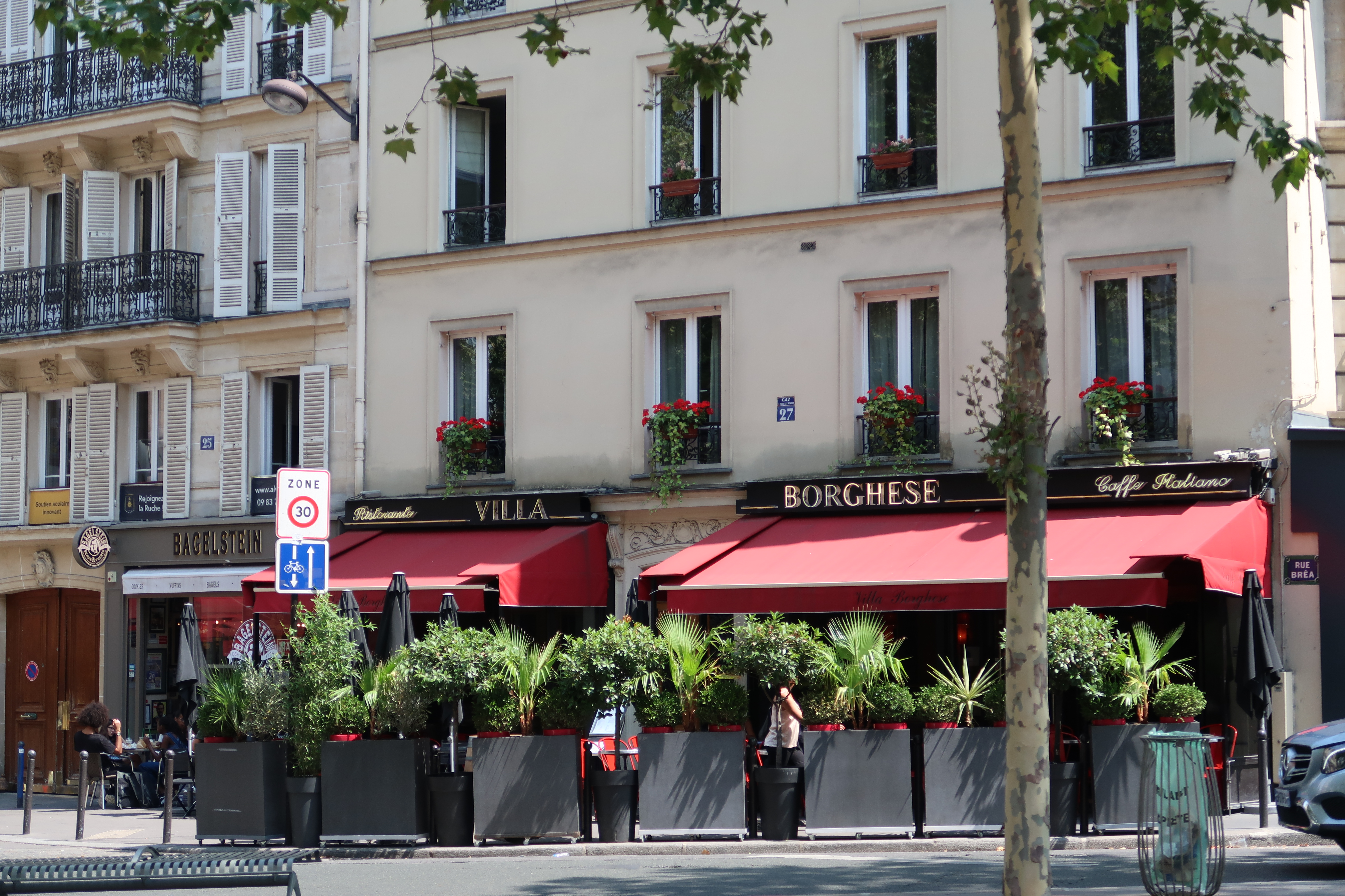 Restaurant Villa Borghese, 27 rue Bréa (Paris, 6e).